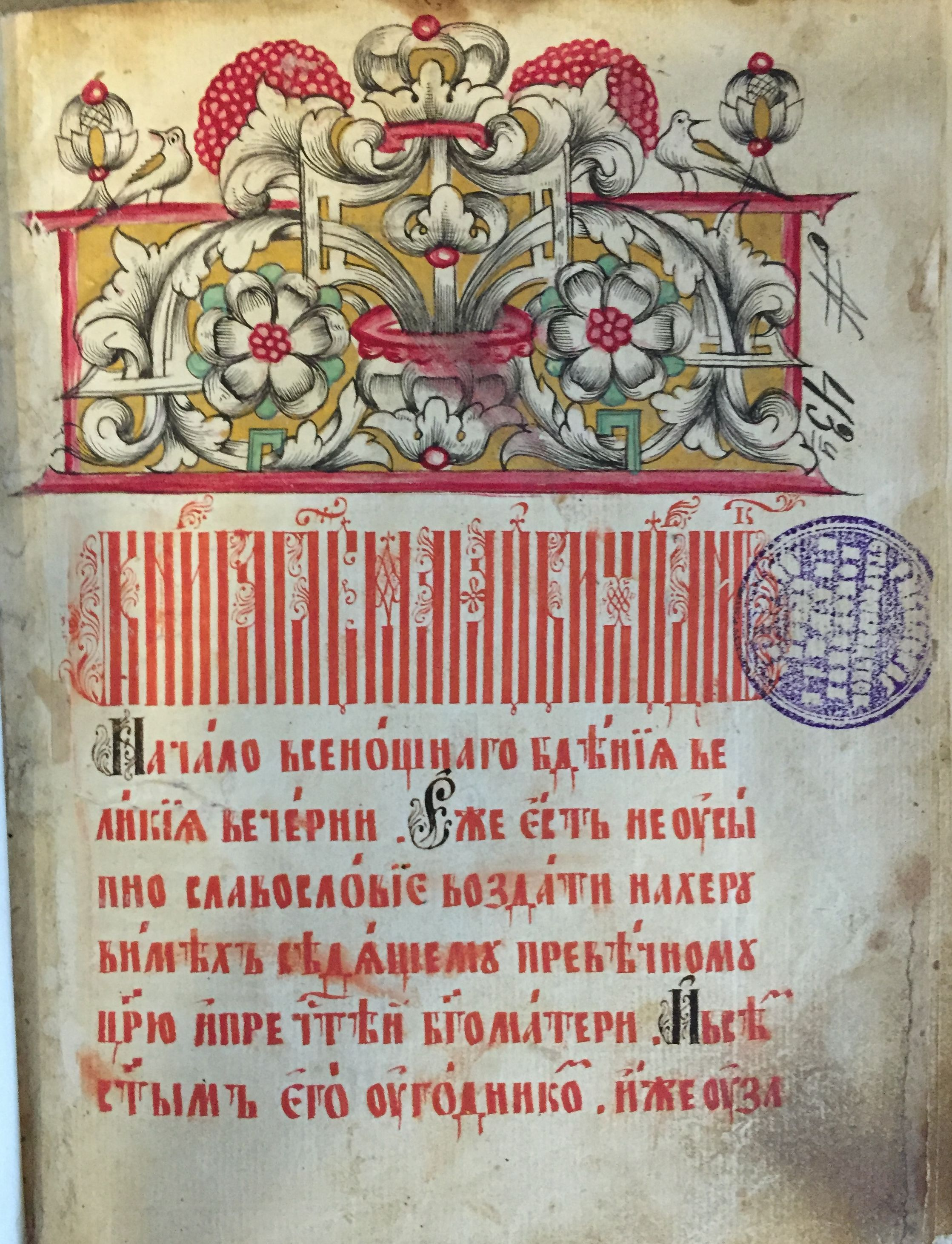 Рукописный Обиход (Выг, 1790-е гг.; частное собрание)